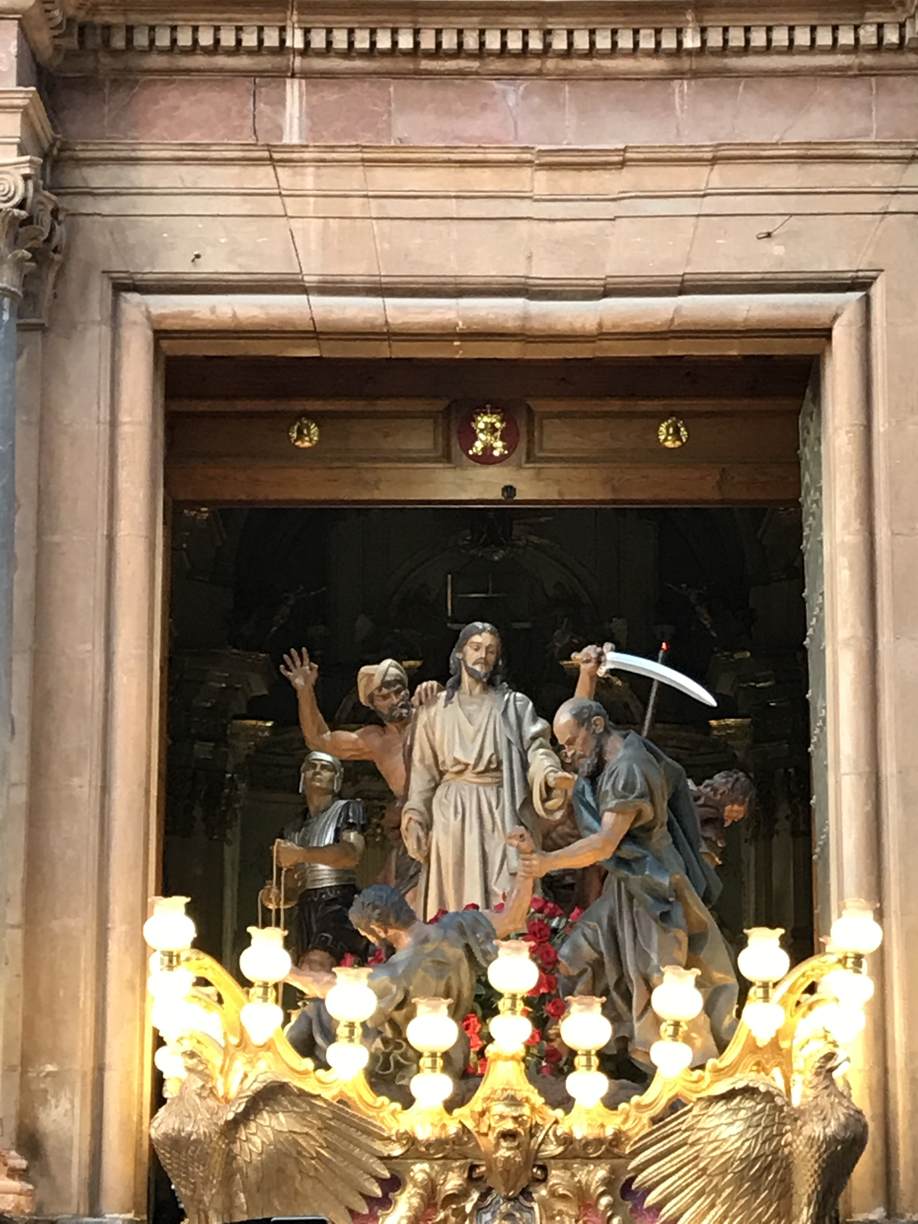 Cofradía del Prendimiento de Orihuela.